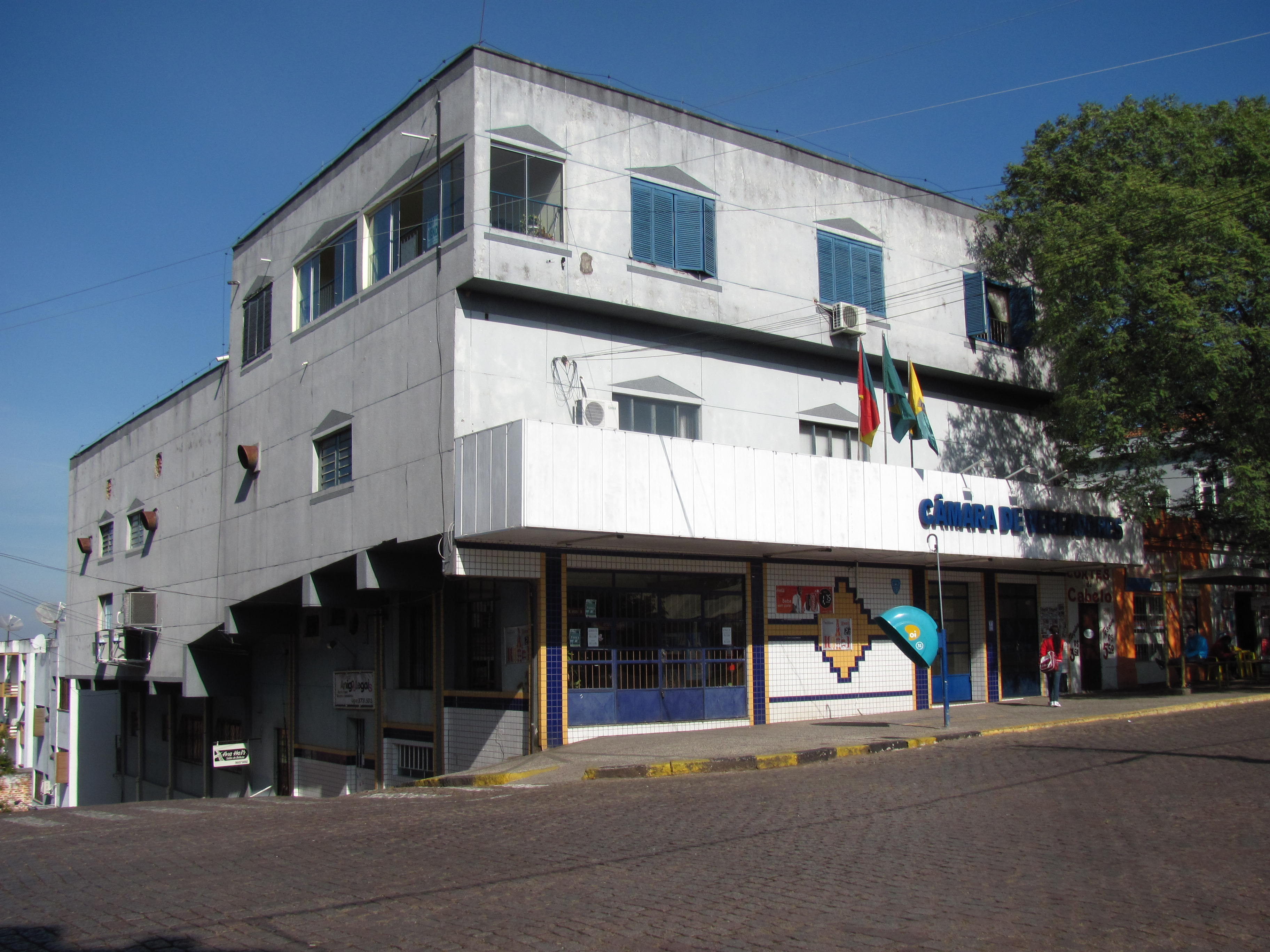 Câmara de Vereadores de Rio Pardo